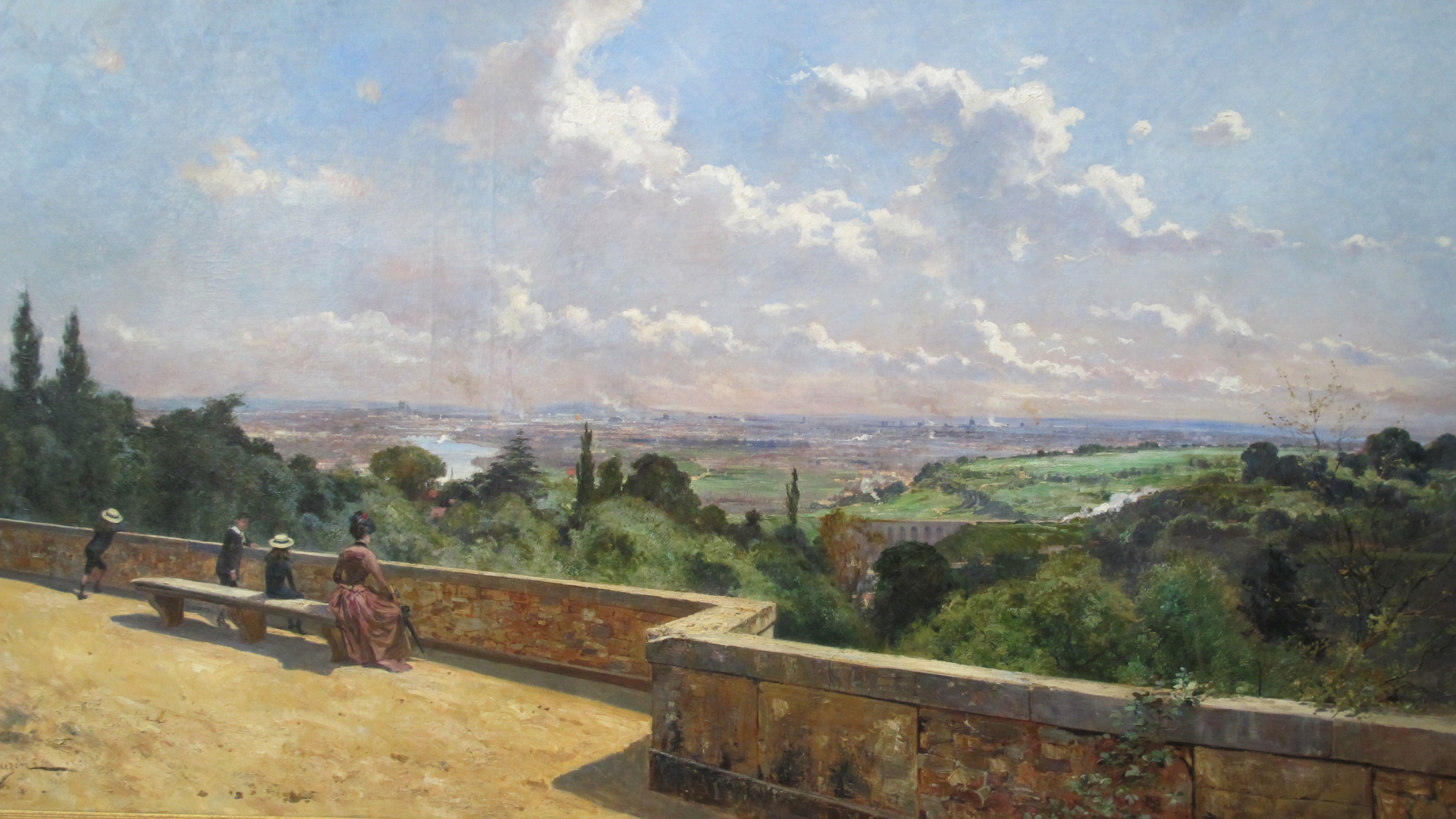 Vue prise depuis la terrasse de Meudon, 1889, Louis Tauzin, Musée des Beaux-Arts de Bordeaux.